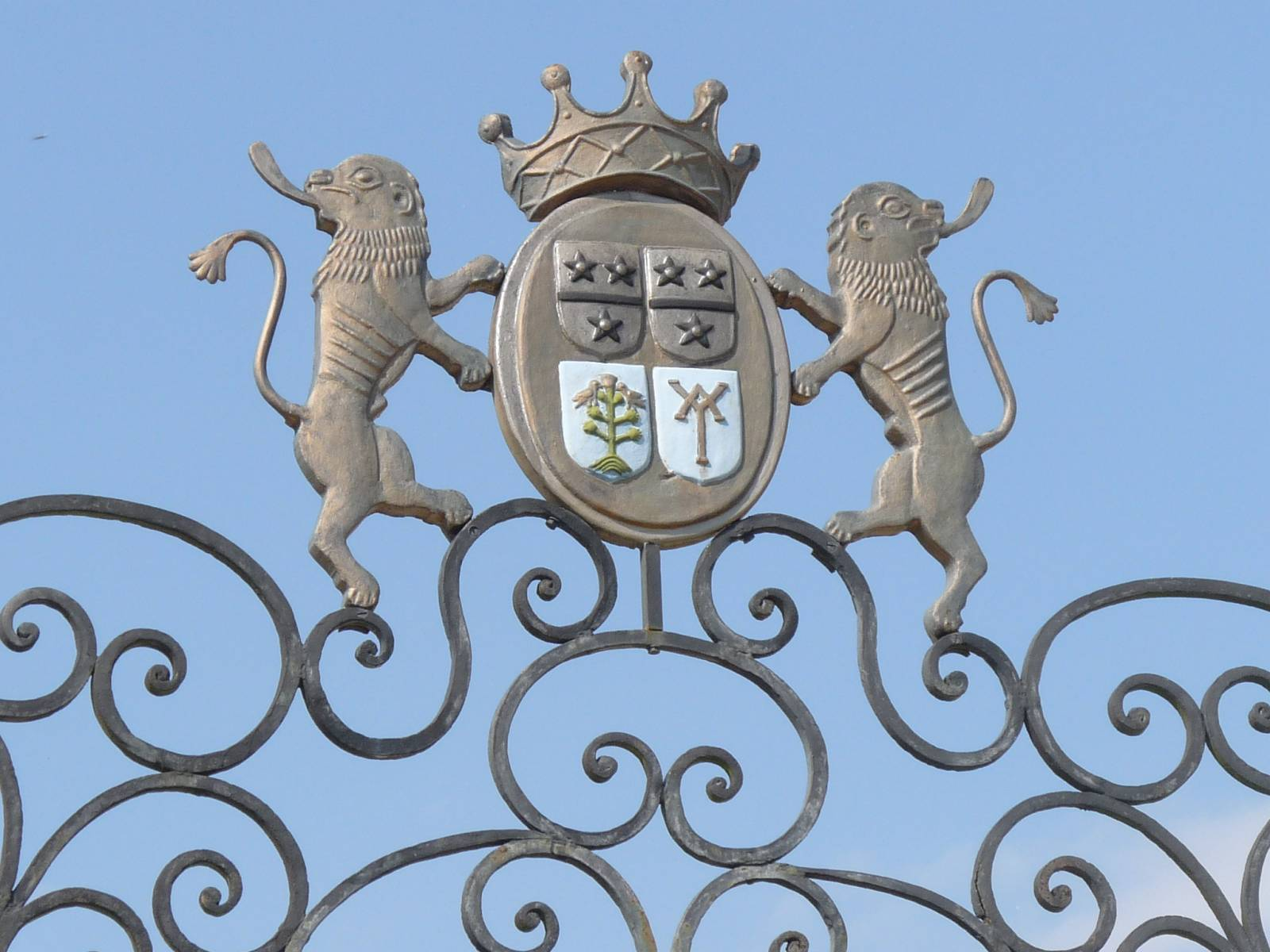 Blason à l'entrée de la mairie de Gondeville, Charente, France